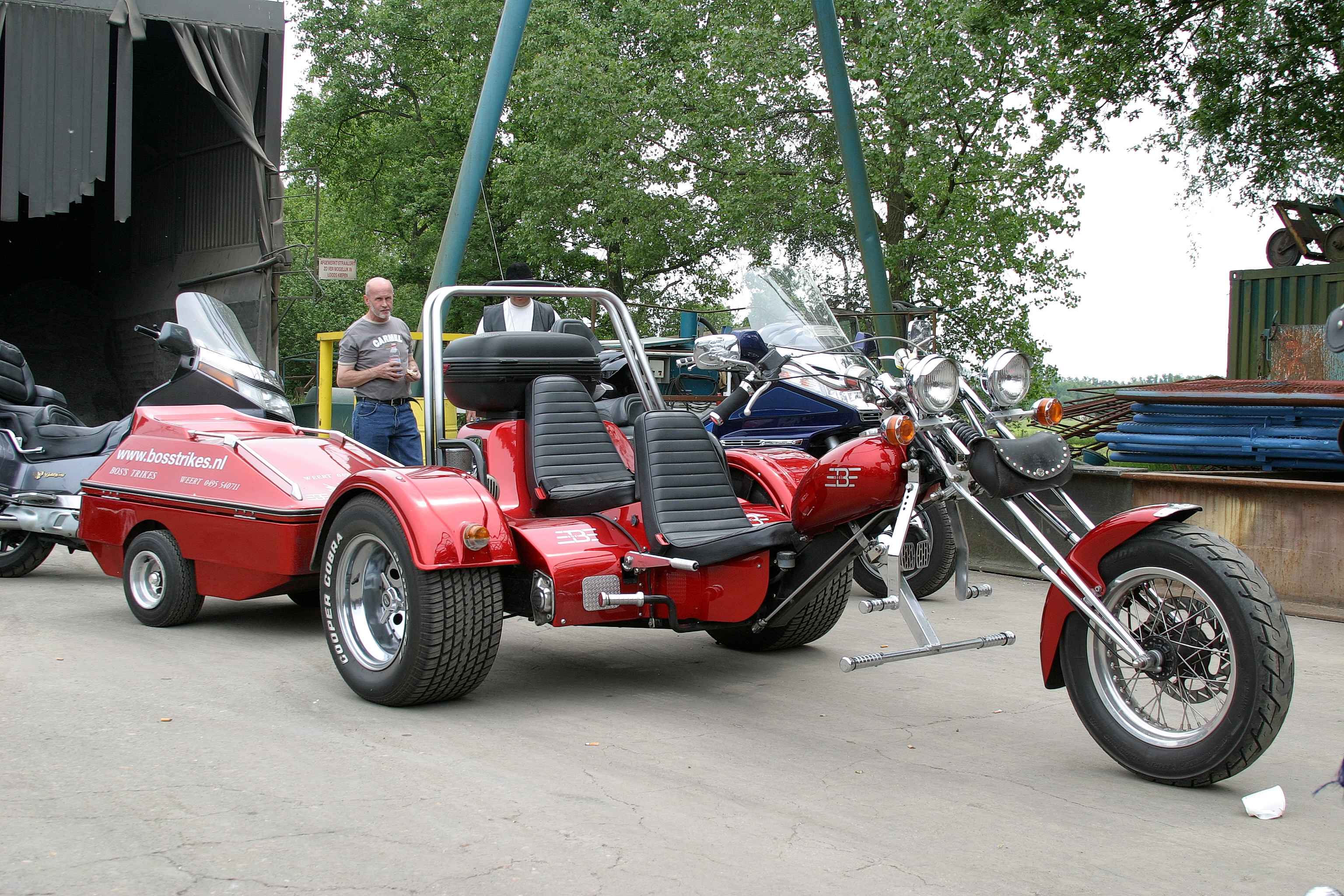 Eigen foto Piero